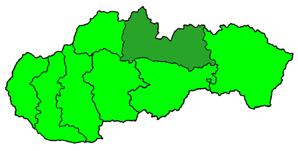 Mappa della diocesi cattolica (roman catholic) di Spis, in Slovacchia. Lavoro personale.